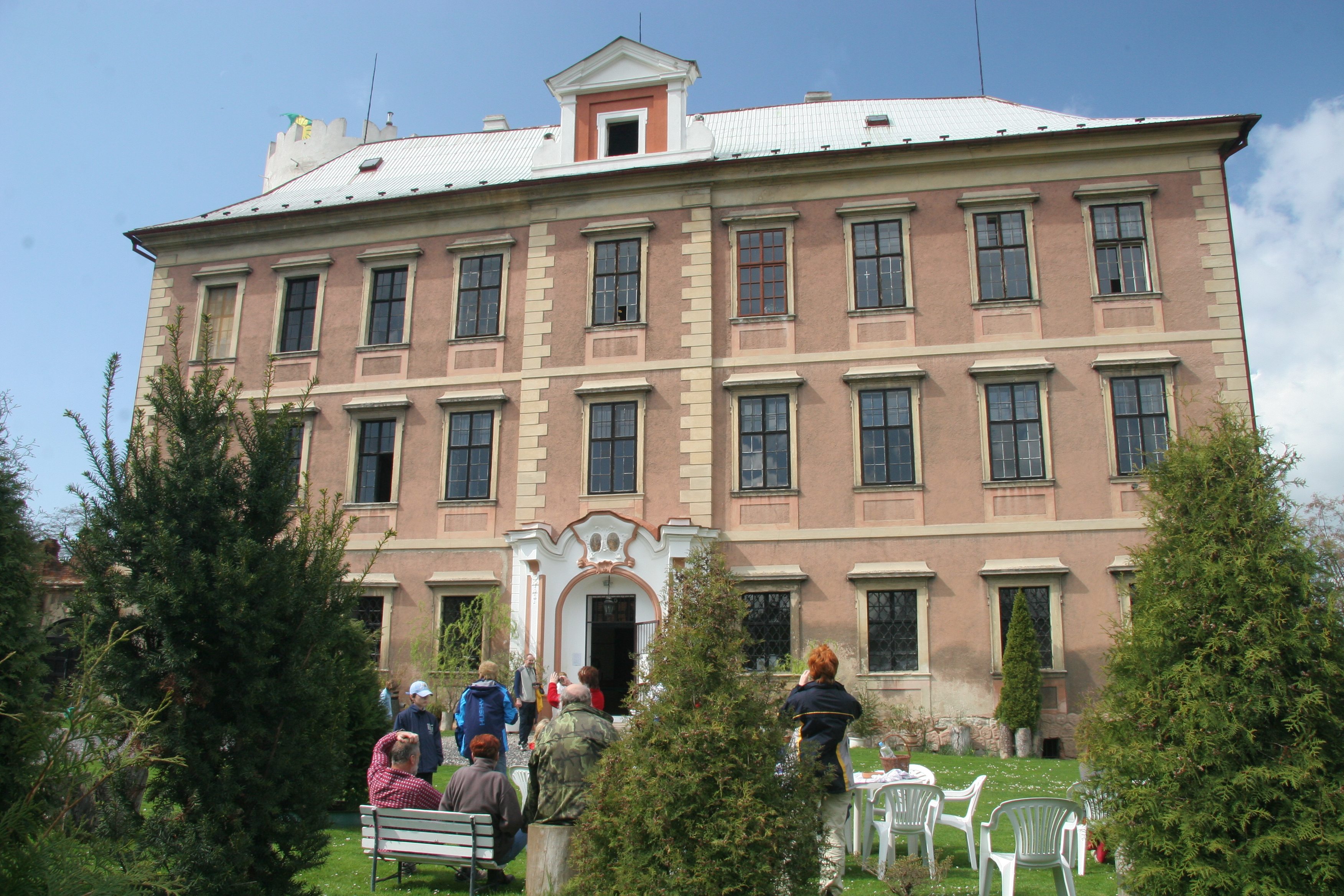 Zámek Líčkov, Železná 1, Líčkov